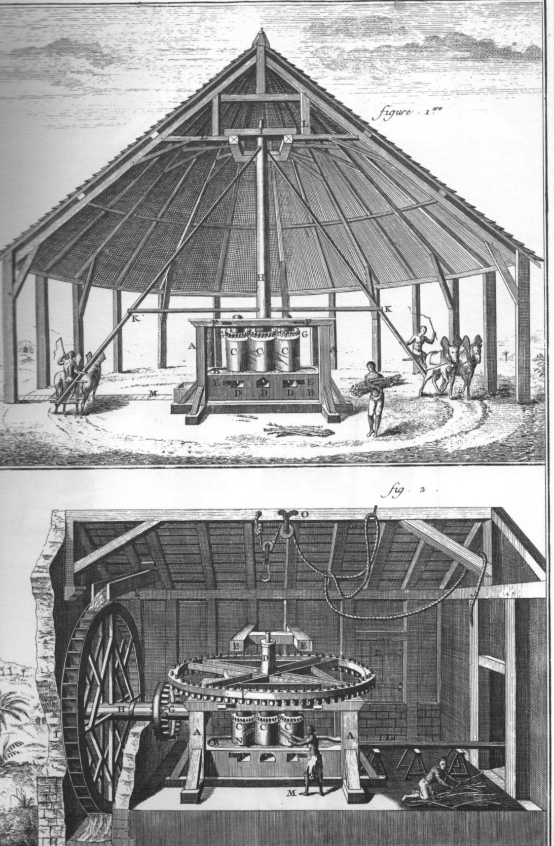 Une des planches "sucrerie de l'Encyclopédie de d'Alembert et Diderot